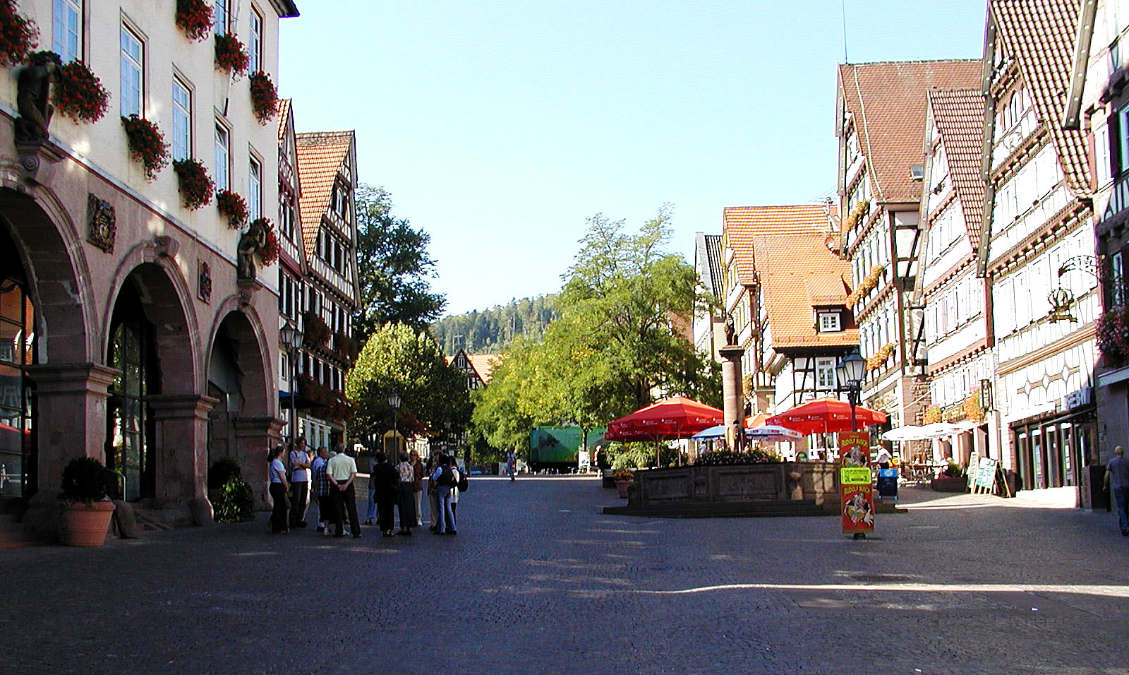 Calw Marktplatz